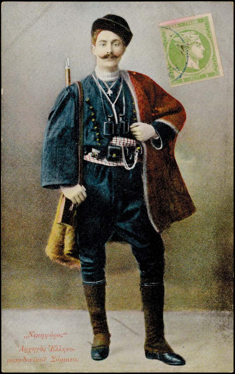 Гръцкият офицер и андартски капитан Йоанис Деместихас (Никифорос)